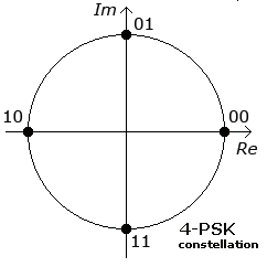 constellation of a 4-psk modulation (example)